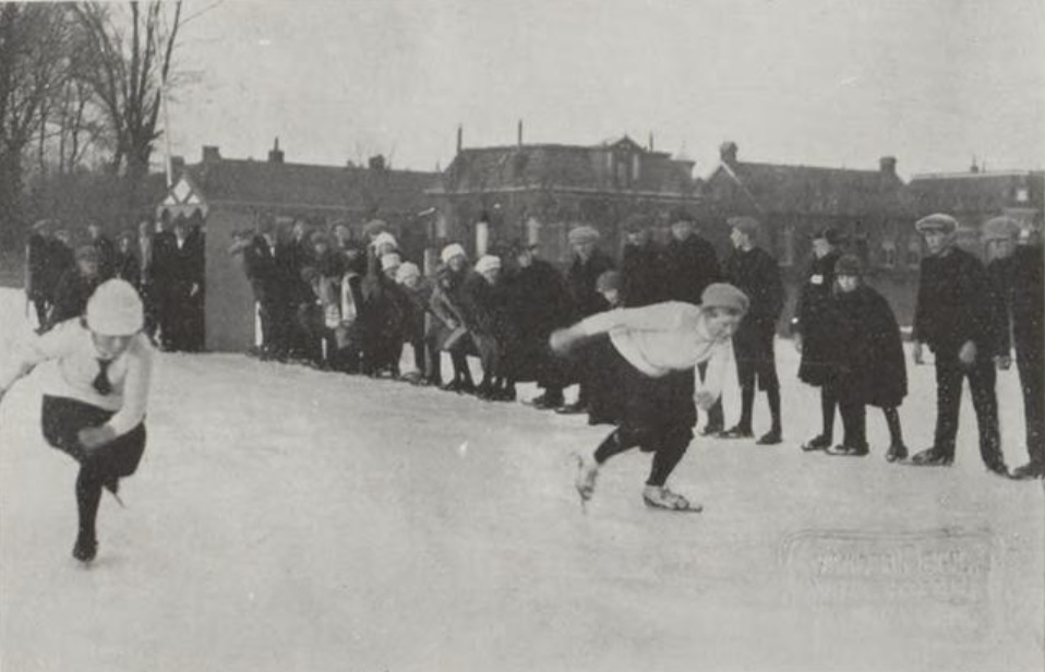 Janna van der Meulen (links) and Martha Hemminga (rechts) tijdens een schaatswedstrijd in Warga in 1924